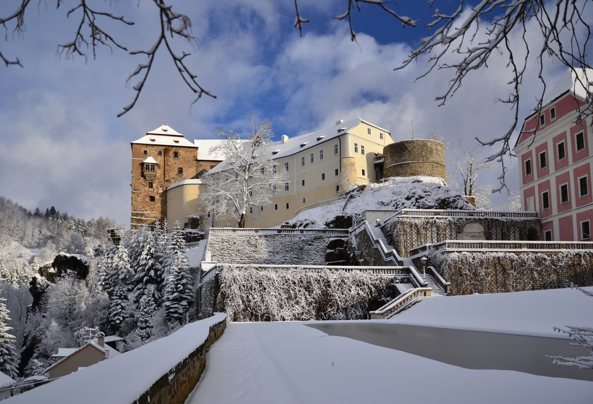 Hrad a zámek Bečov nad Teplou, Bečov nad Teplou 9, Bečov nad Teplou.